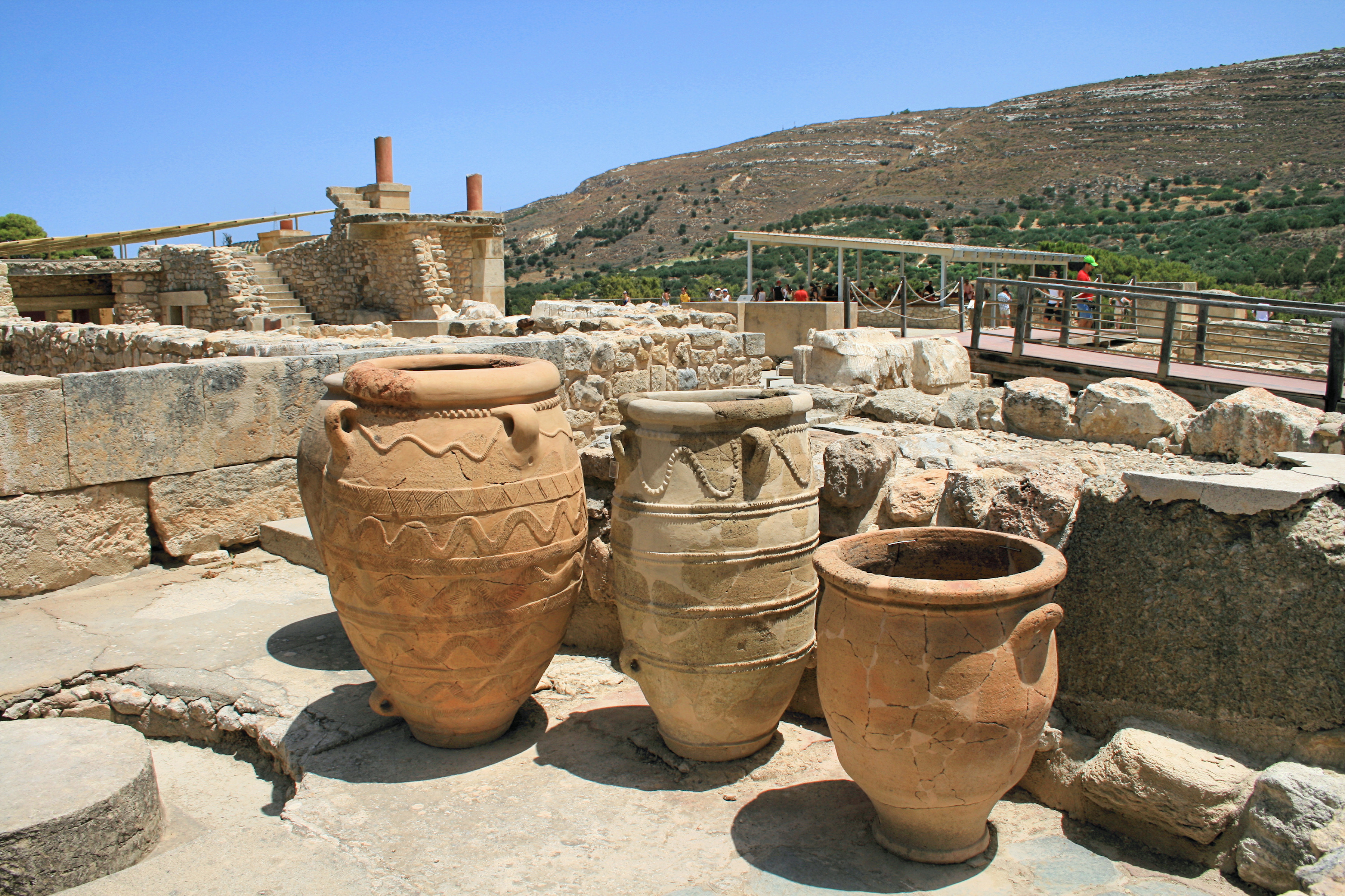 Pithoi auf dem ersten Obergeschoss des minoischen Palastes von Knossos auf der griechischen Insel Kreta